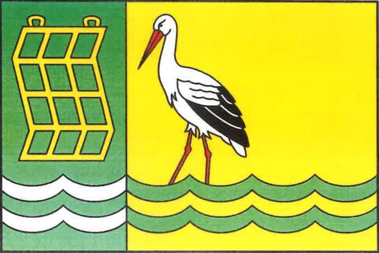 Vlačice vlajka